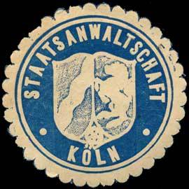 Siegelmarke der Staatsanwaltschaft Köln mit dem Landeswappen Nordrhein-Westfalens Sealing stamp Title: Staatsanwaltschaft - Köln Description: blau, weiß, geprägt Place: Köln size: 4 cm